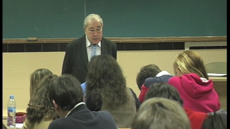 Dalmacio Negro impartiendo una Lección magistral en Derecho de la USP-CEU